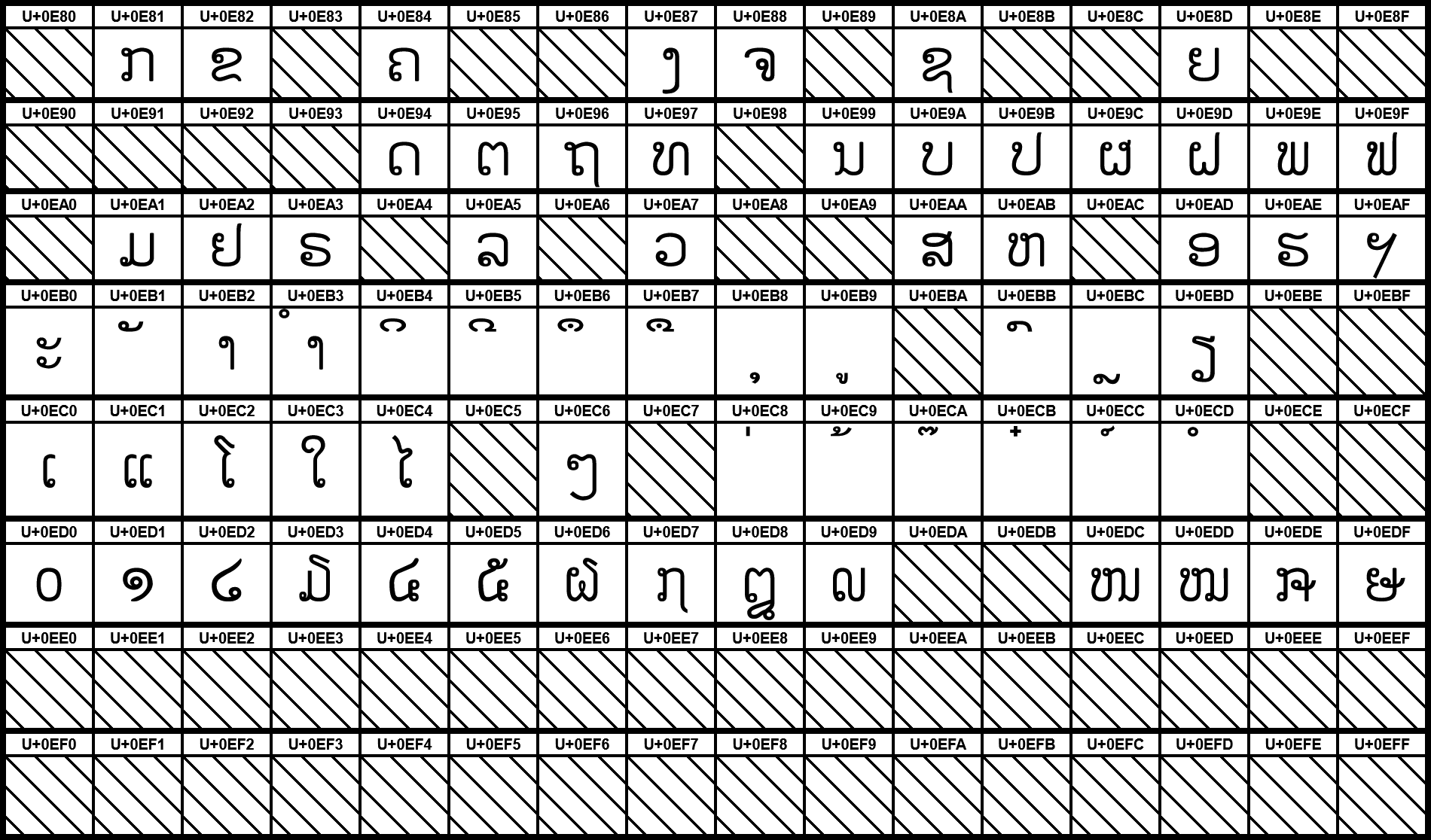 Grafiktafel für den Unicodeblock Laotisch. Schraffierte Felder sind unbesetzte Codepoints. Hellgrau gefärbte Felder kennzeichnen bisher fehlende Zeichen.